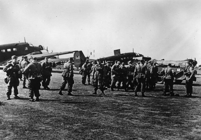 Deutsche Fallschirmtruppen berennen Korinth. Der Einsatz ist befohlen. Alles macht sich fertig.